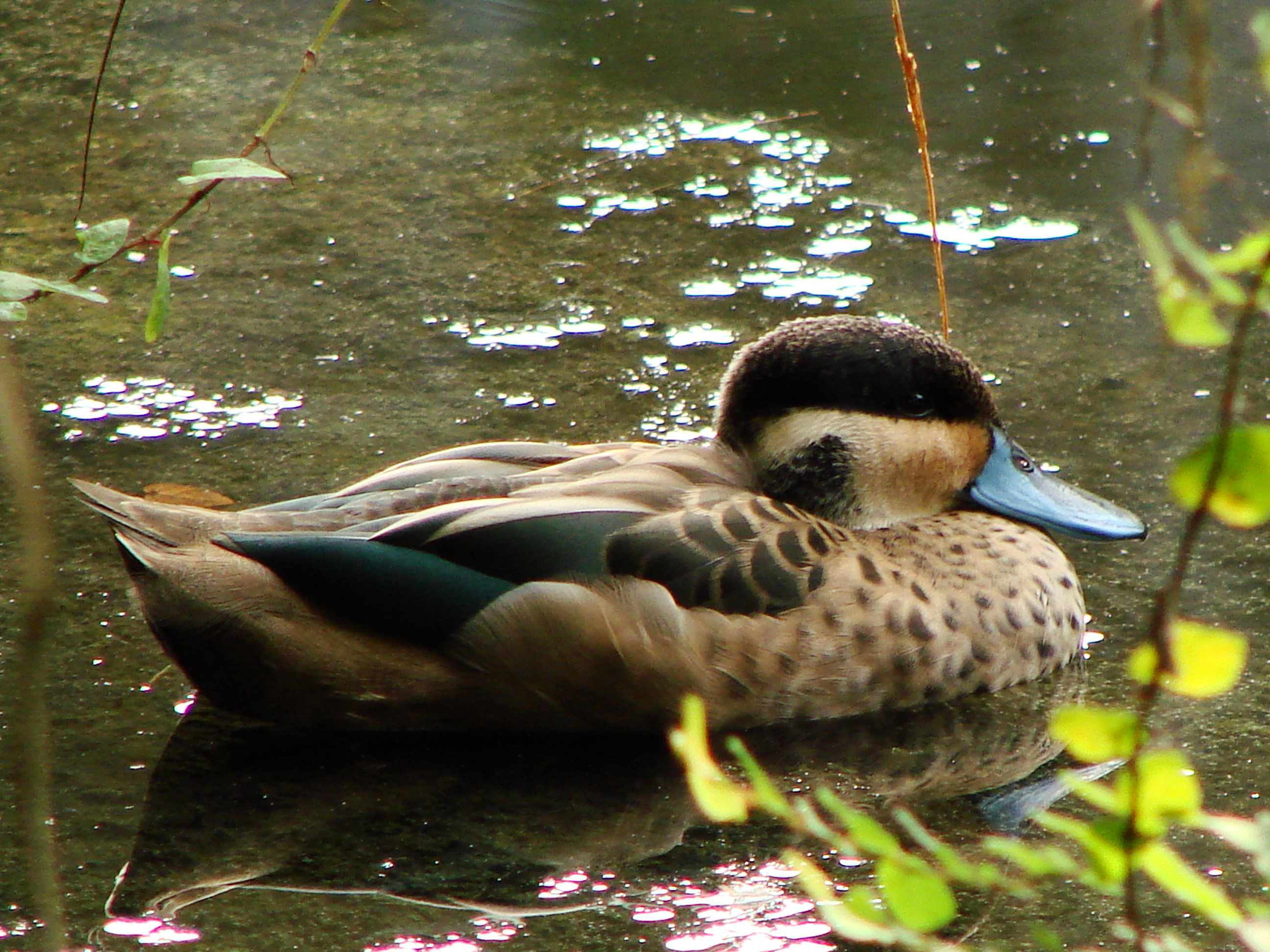 sarcelle hottentote (Anas hottentota)